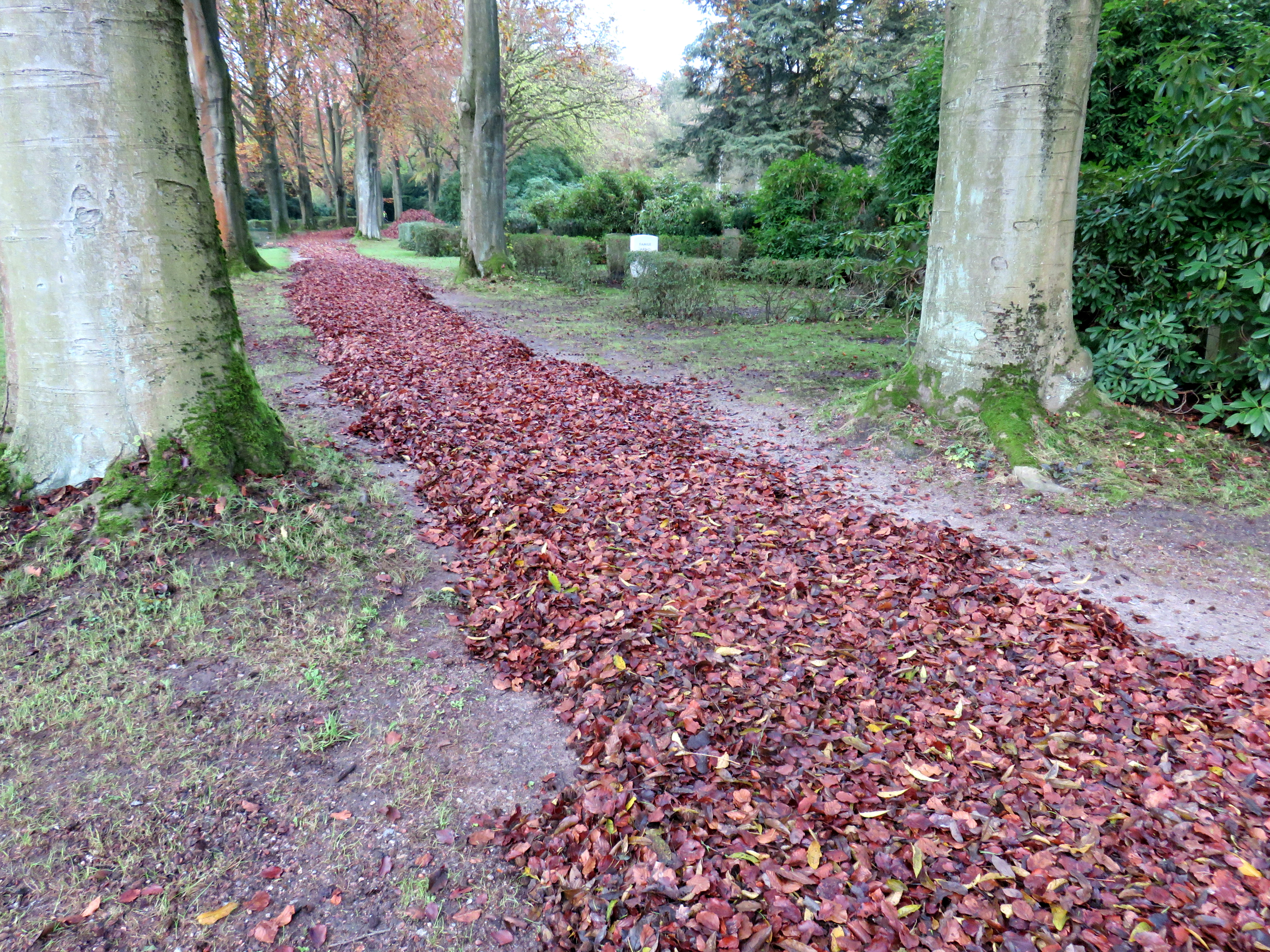 Herbstlaub-Bearbeitung auf dem Friedhof Ohlsdorf am Beispiel Planquadrat Q 37 (westlich T-Teich).